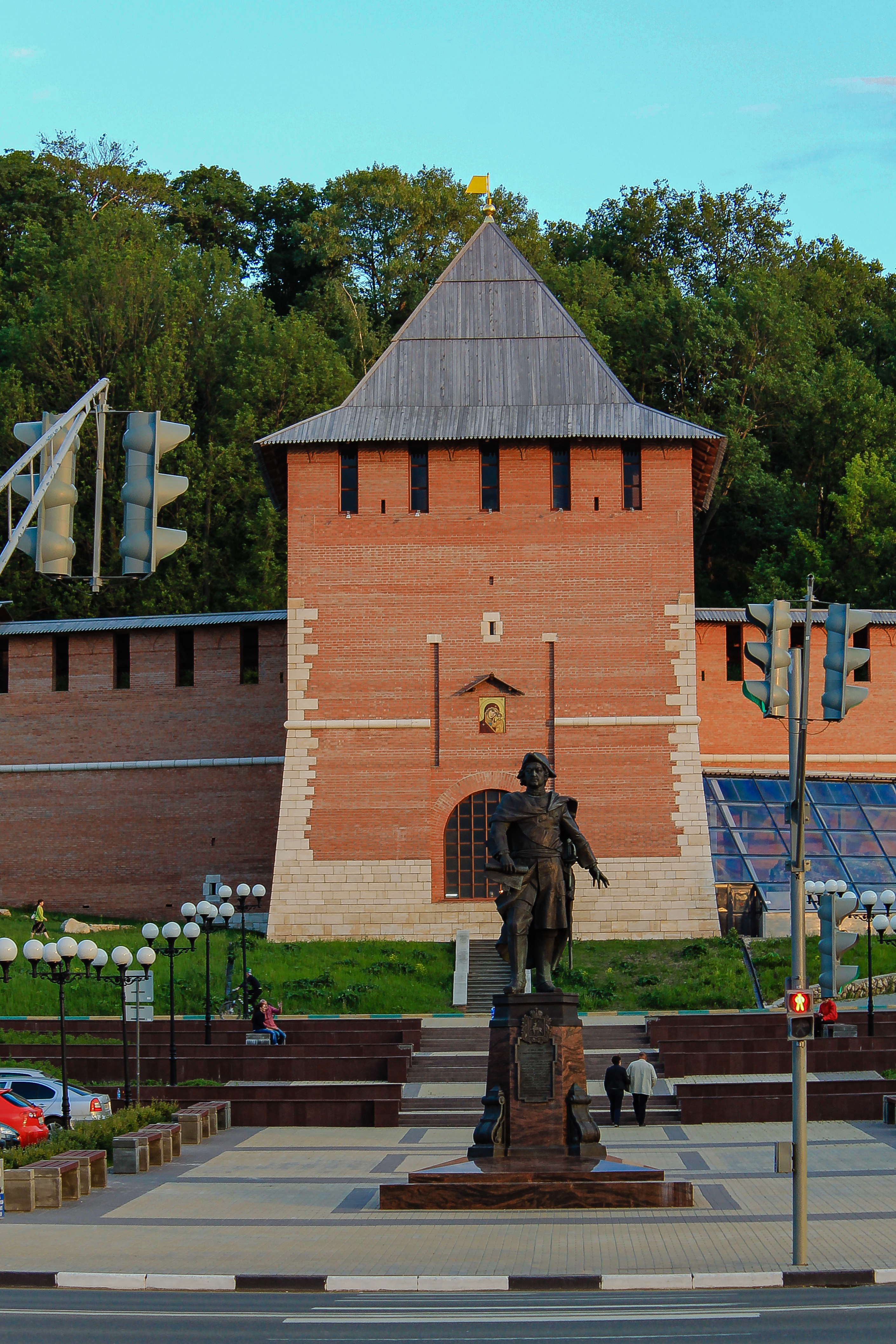 Башня Зачатьевская (Зачатская): Кремль, Нижний Новгород, Нижегородская область